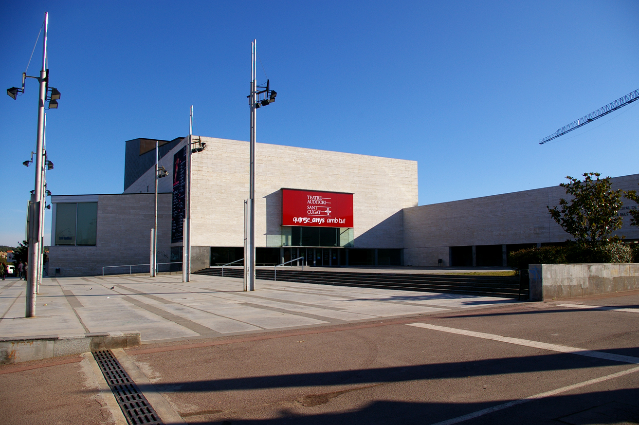 Teatre Auditori de Sant Cugat del Vallès (Vallès Occidental, Catalunya).